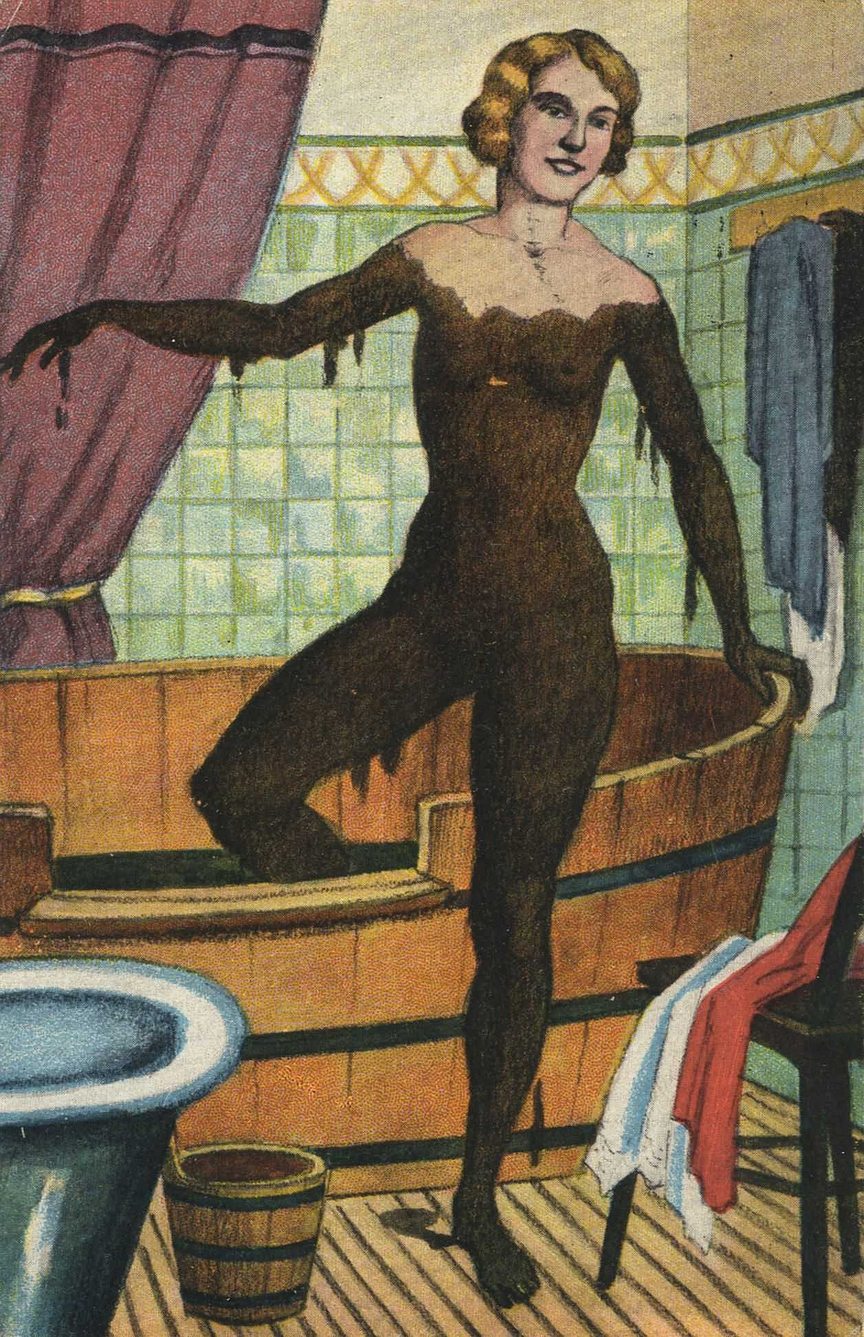 Badende Frau, Thermalbad, Moorbad.